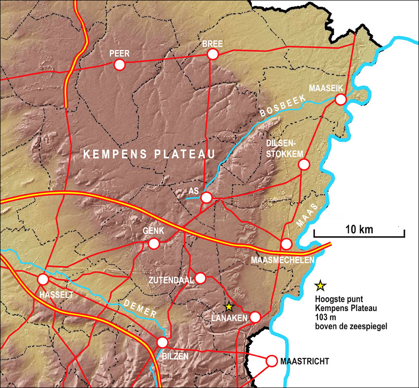 Kaart van het Kenpens Plateau